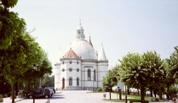 Zelfgemaakte foto